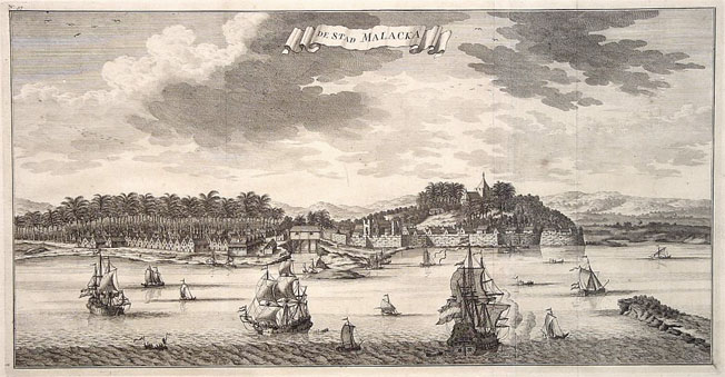 Historische Ansicht von Malakka; von Valentijn| aus dem Jahr 1726; Kupferstich; Original in Amsterdam.